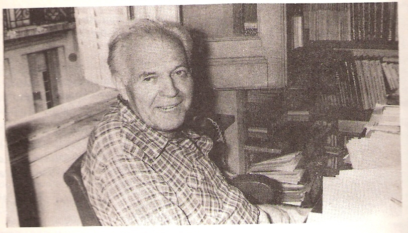 editor Jose Boris Spivacow EUDEBA y CENTRO EDITOR